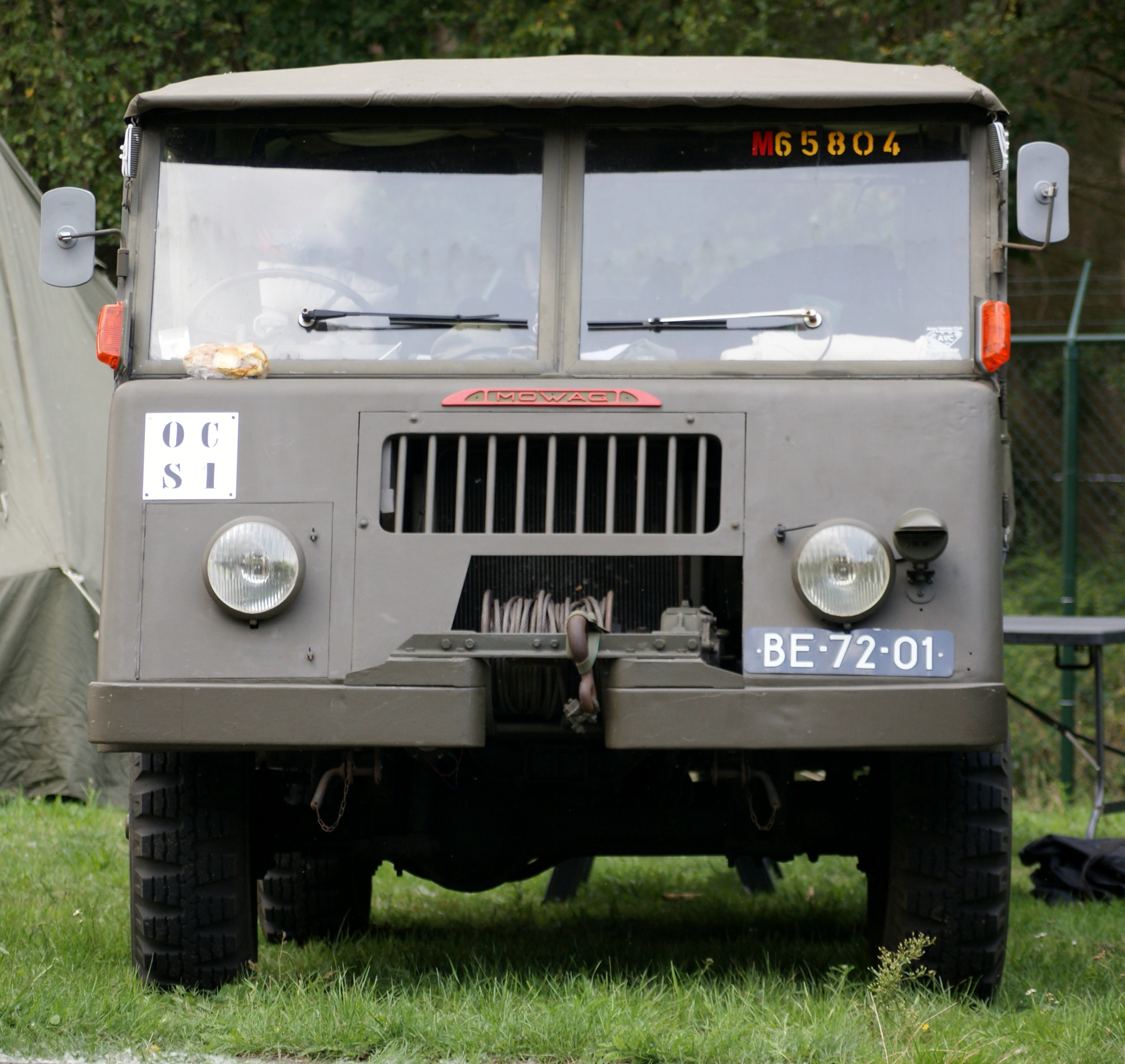 Mowag GW3500 Manschapswagen